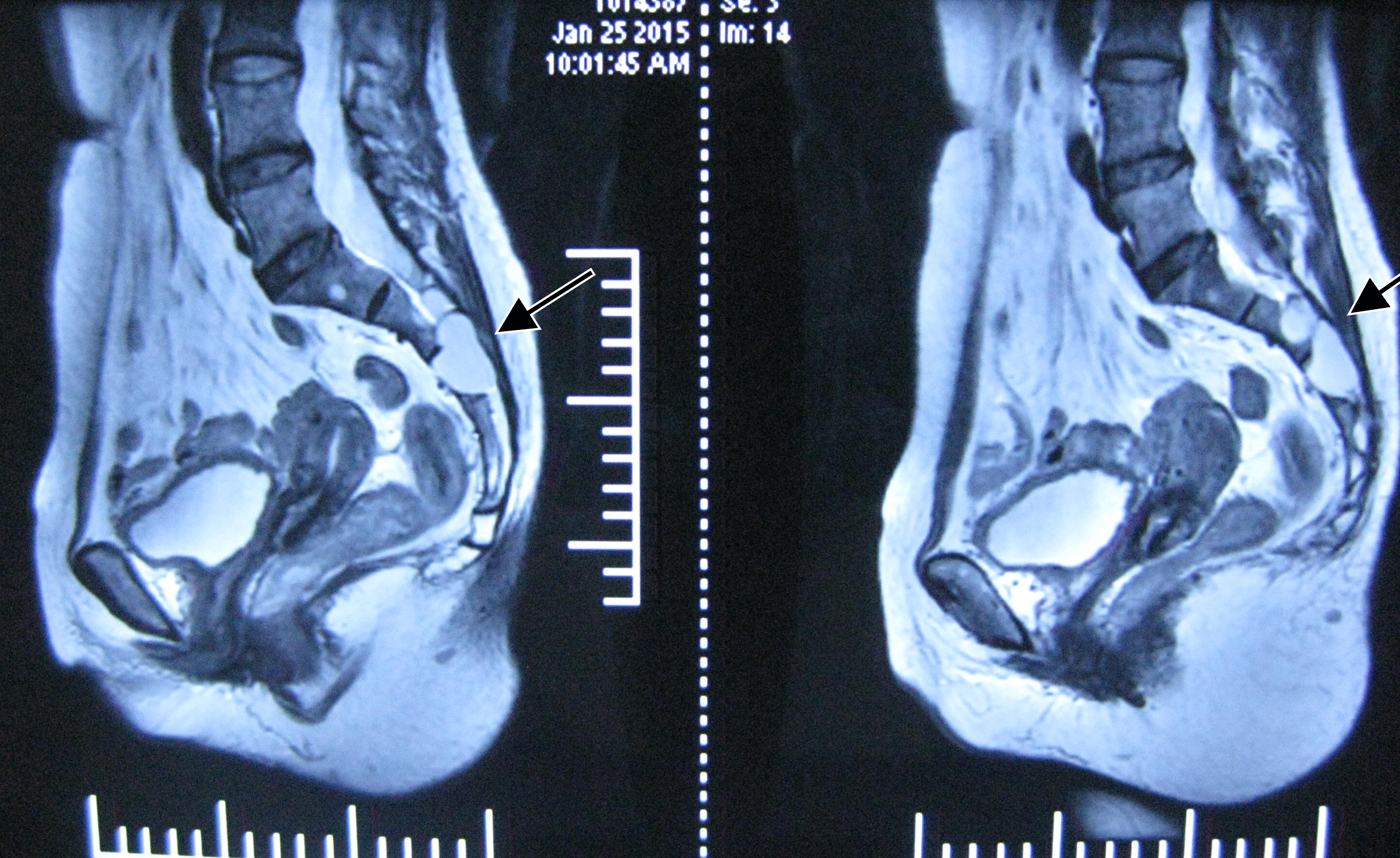 骶管囊肿的磁共振影像